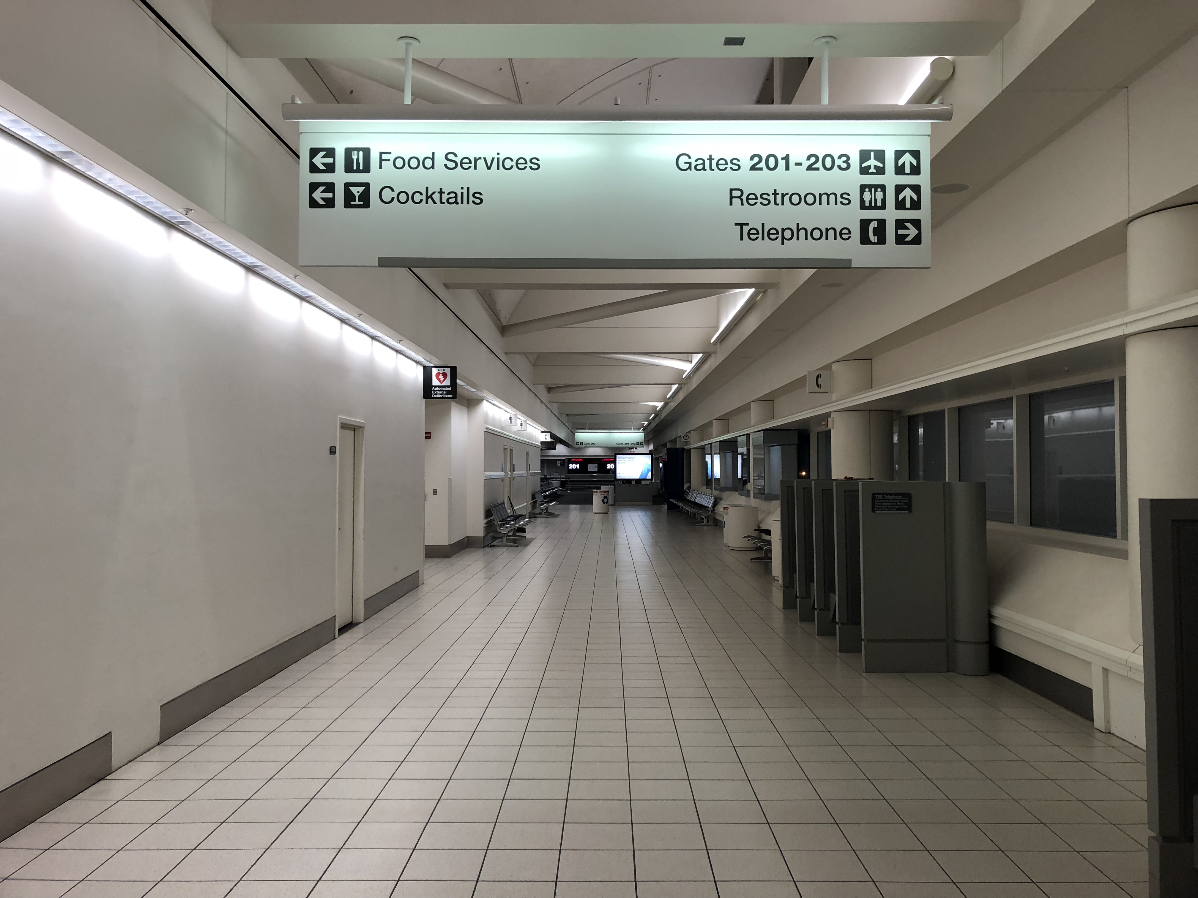 Terminal 2 del Aeropuerto Internacional de Ontario.